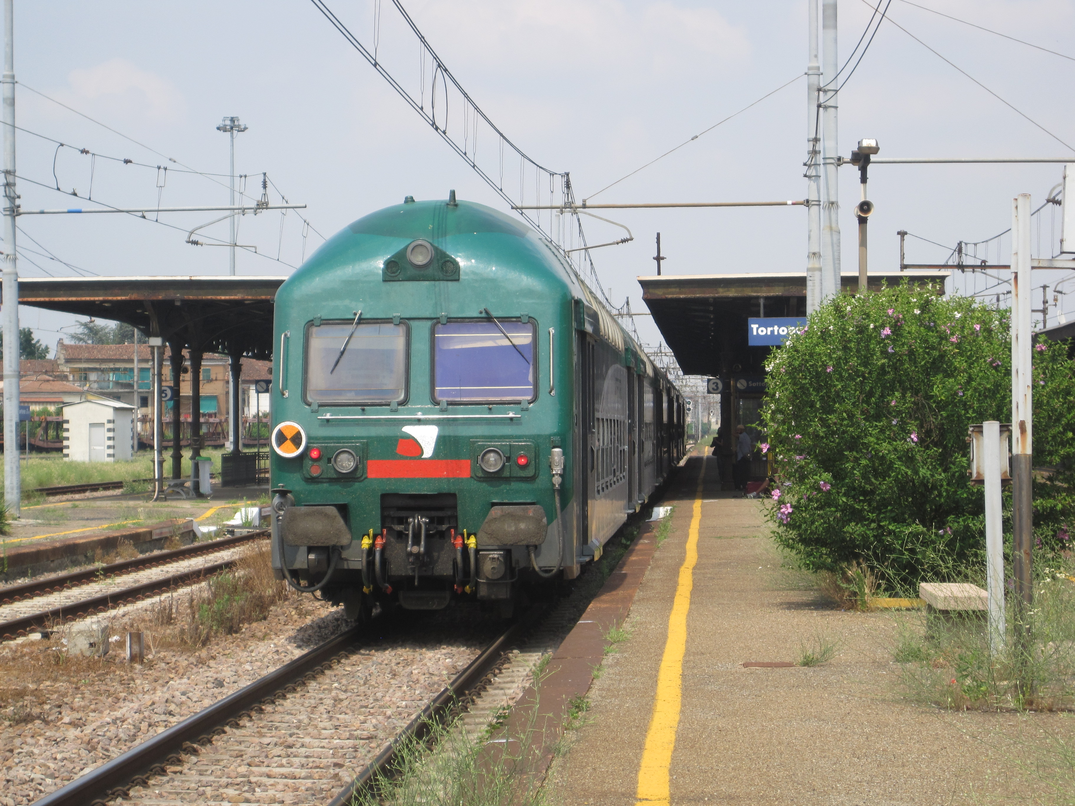 Treno regionale Trenord a Tortona.